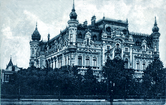 Altes rumänisches Außenministerium nach 1900, ehemaliges Sturdza-Palais